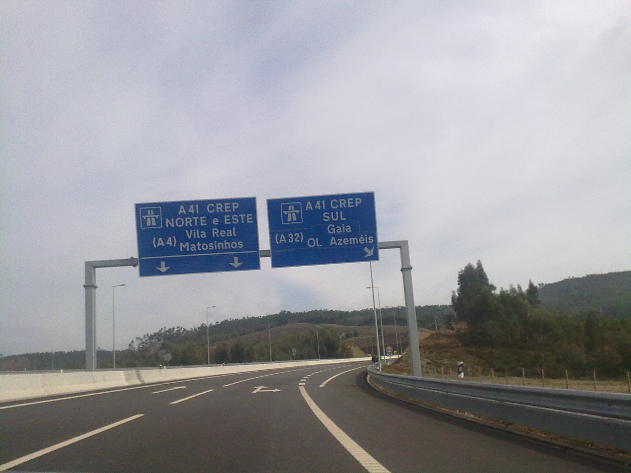 A43 perto de Aguiar de Sousa, junto às saídas para a CREP (A41).